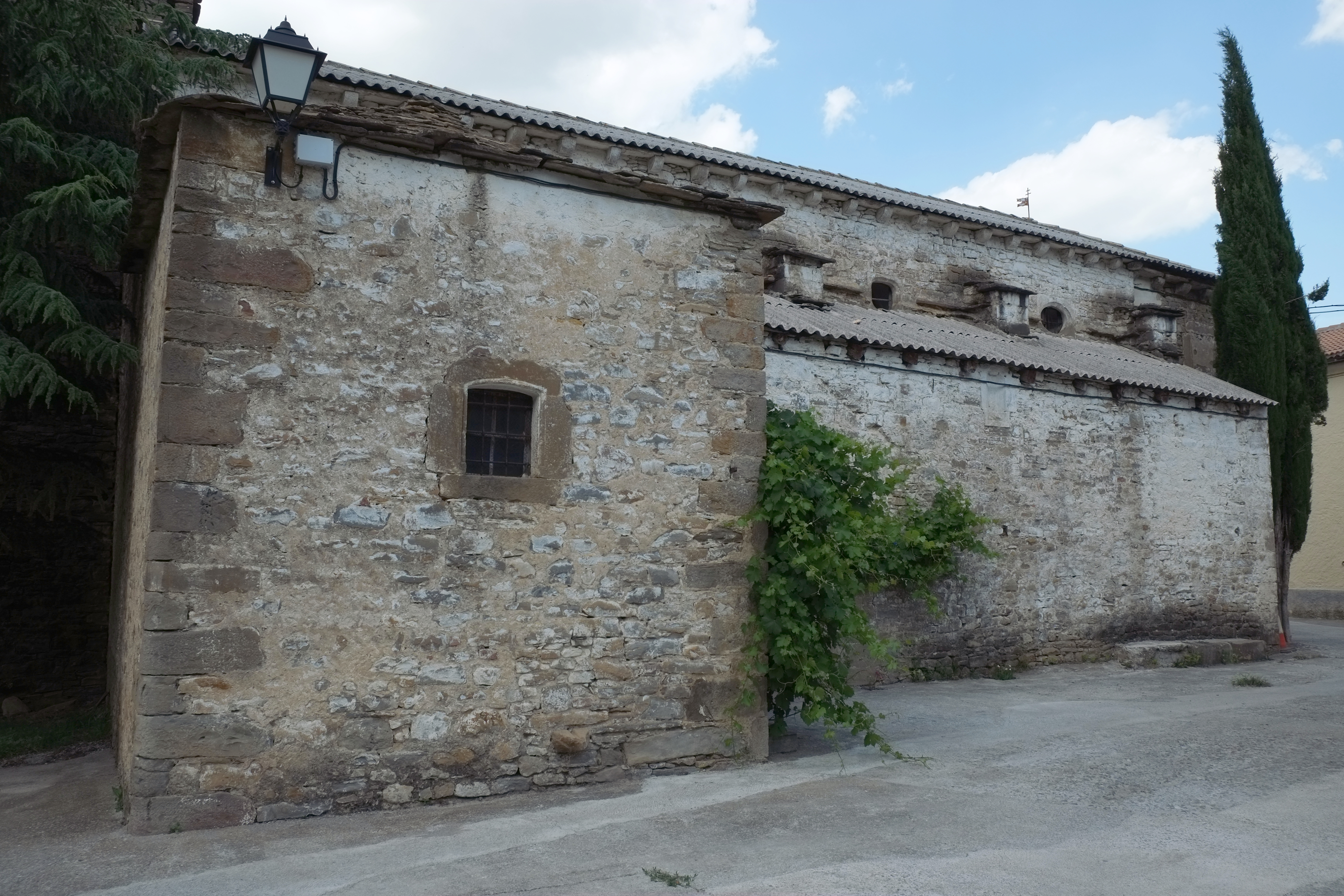 Kirche San Martín in Ullé in der Provinz Huesca in Aragonien (Spanien)